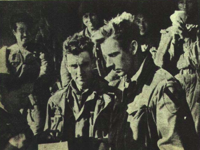 1950年云山战斗美军被俘騎兵第一師